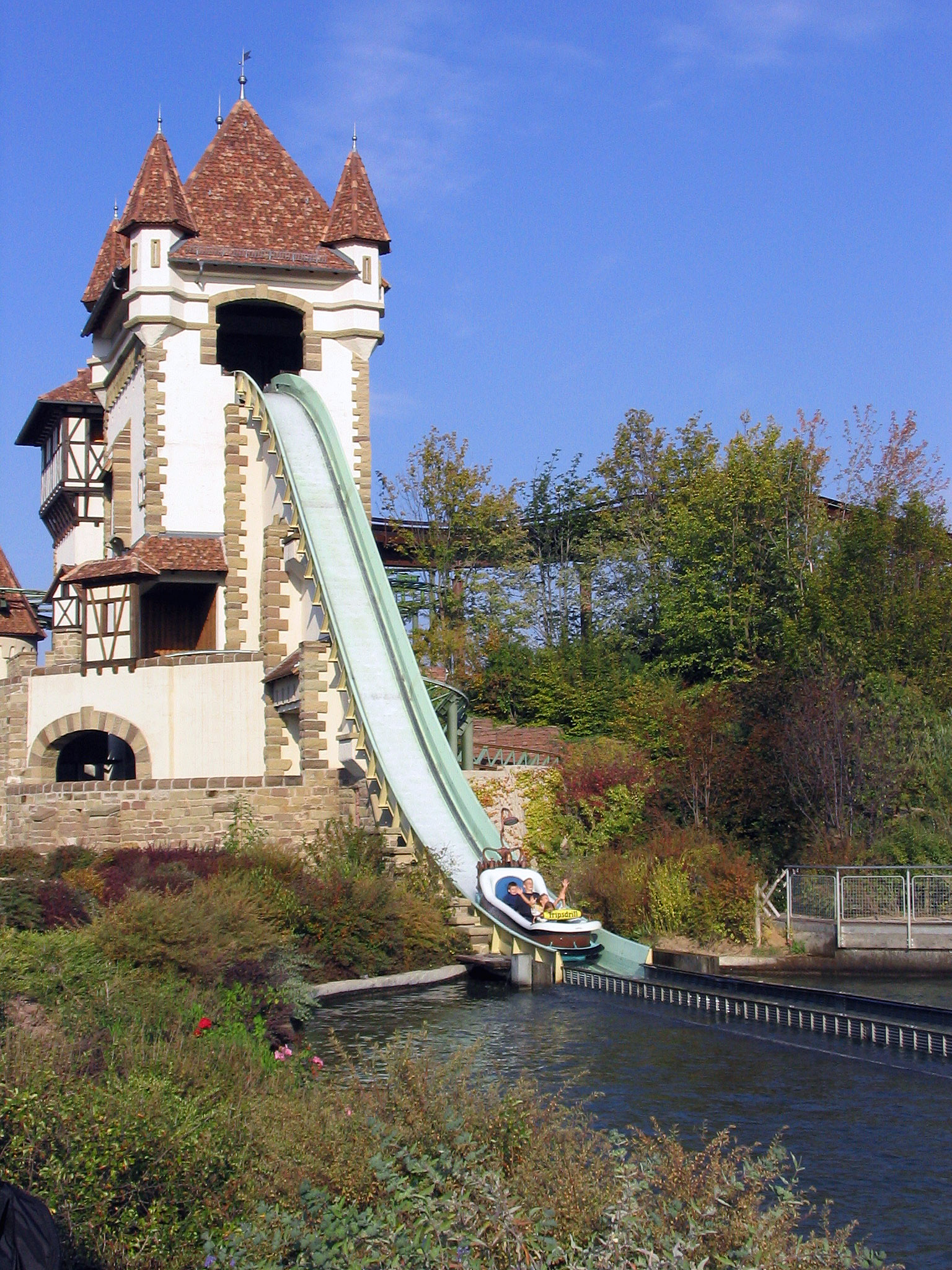 Badewannen-Fahrt zum Jungbrunnen (Log Flume) in Tripsdrill, Germany